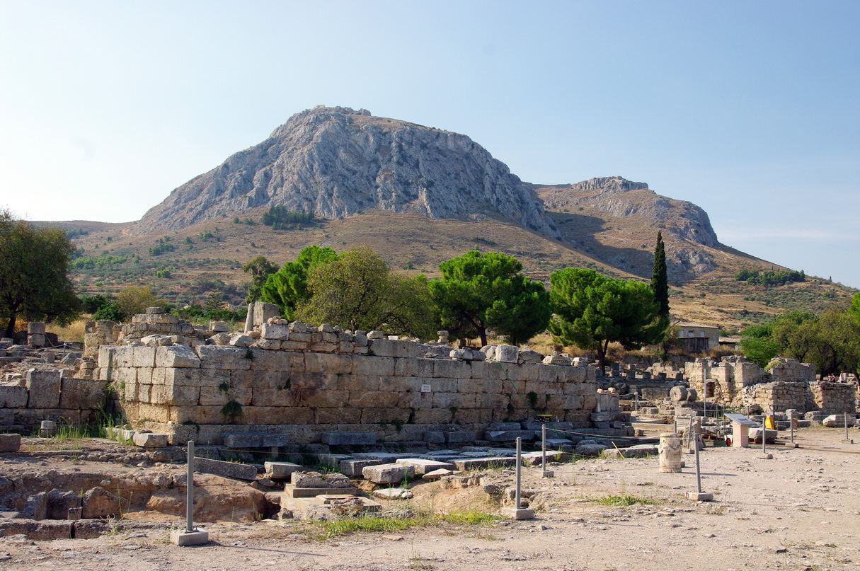 Agora, Bema und Akrokorinth